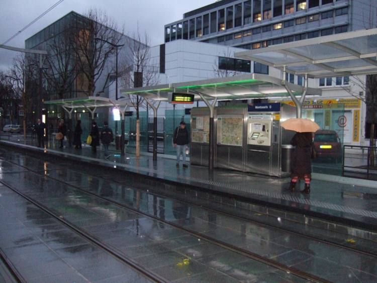 Station Montsouris de la ligne 3 du tramway parisien.